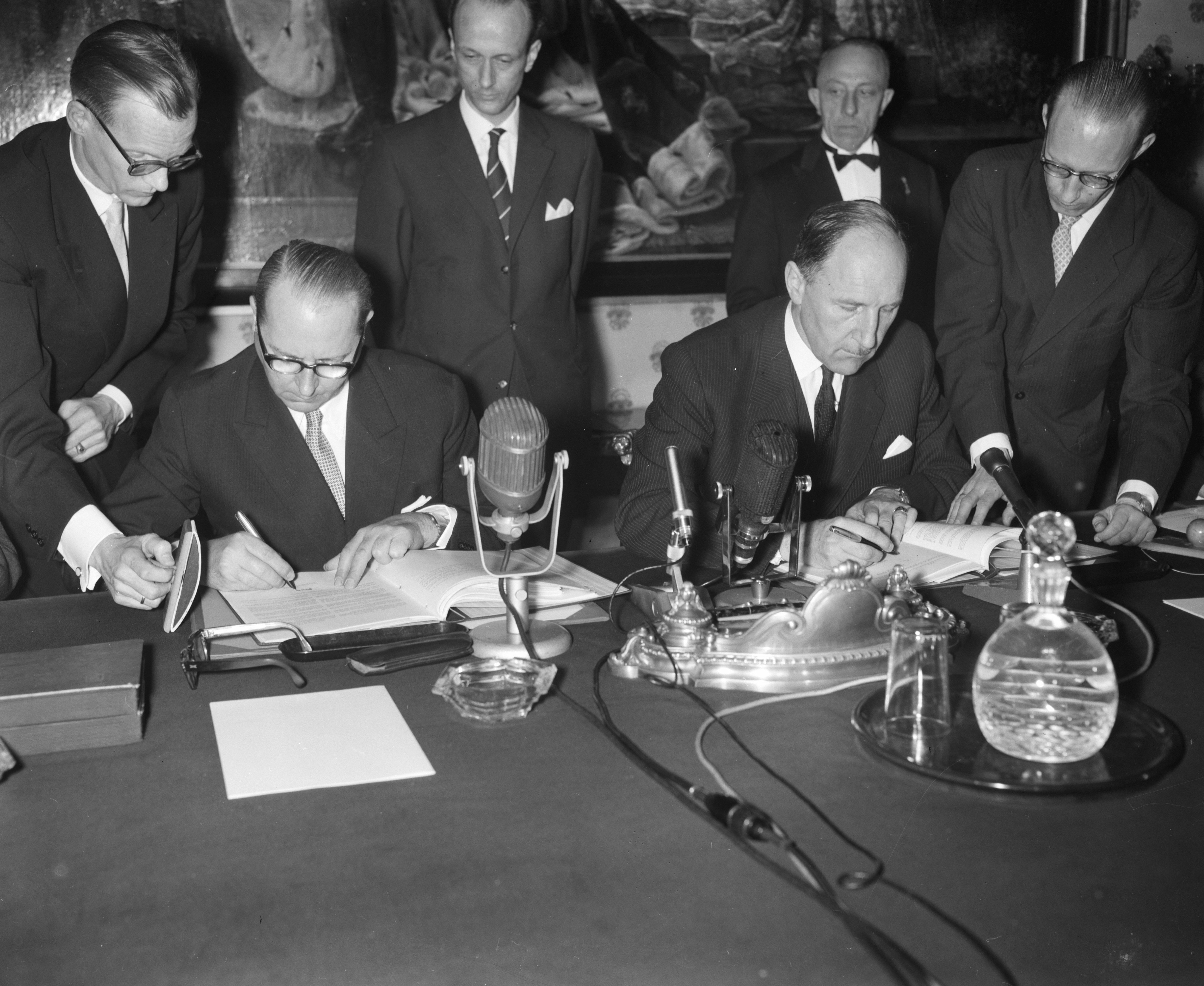 Collectie / Archief : Fotocollectie Anefo Reportage / Serie : [ onbekend ] Beschrijving : Ondertekening van het Nederlands Duitsverdrag door Minister Luns en Minister Von Brentana te Den Haag links Minister Von Brentano en Minister Luns Datum : 8 april 1960 Locatie : Den Haag, Zuid-Holland Trefwoorden : ondertekeningen Persoonsnaam : Brentano, Heinrich von, Luns, J.A.M.H., Luns, Joseph Fotograaf : Bilsen, Joop van / Anefo Auteursrechthebbende : Nationaal Archief Materiaalsoort : Negatief (zwart/wit) Nummer archiefinventaris : bekijk toegang 2.24.01.04 Bestanddeelnummer : 911-1578